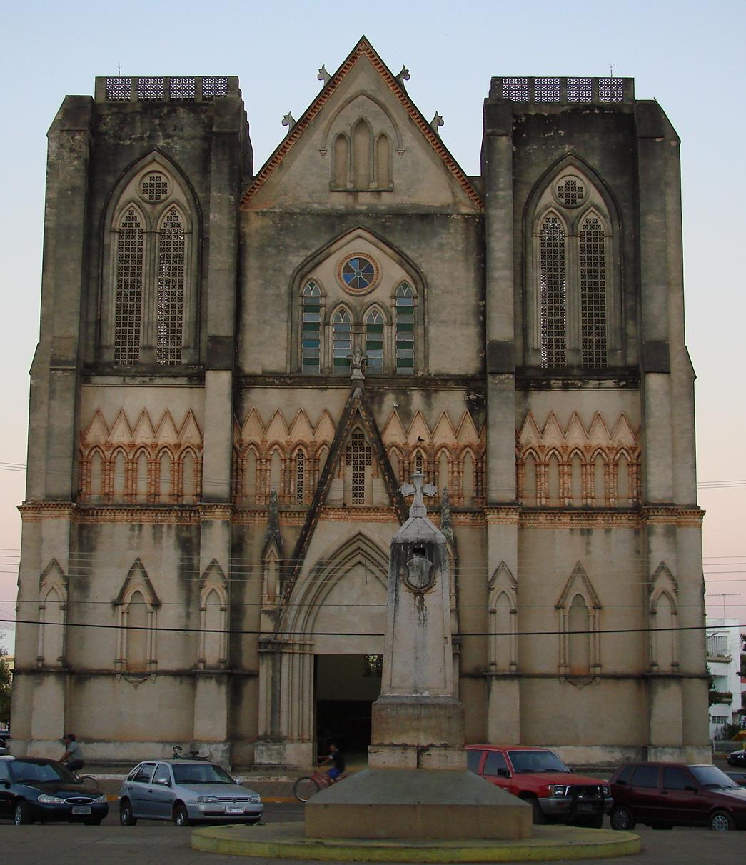 Marco do Jauro, em frente à Catedral de São Luís, em Cáceres-Mato Grosso.